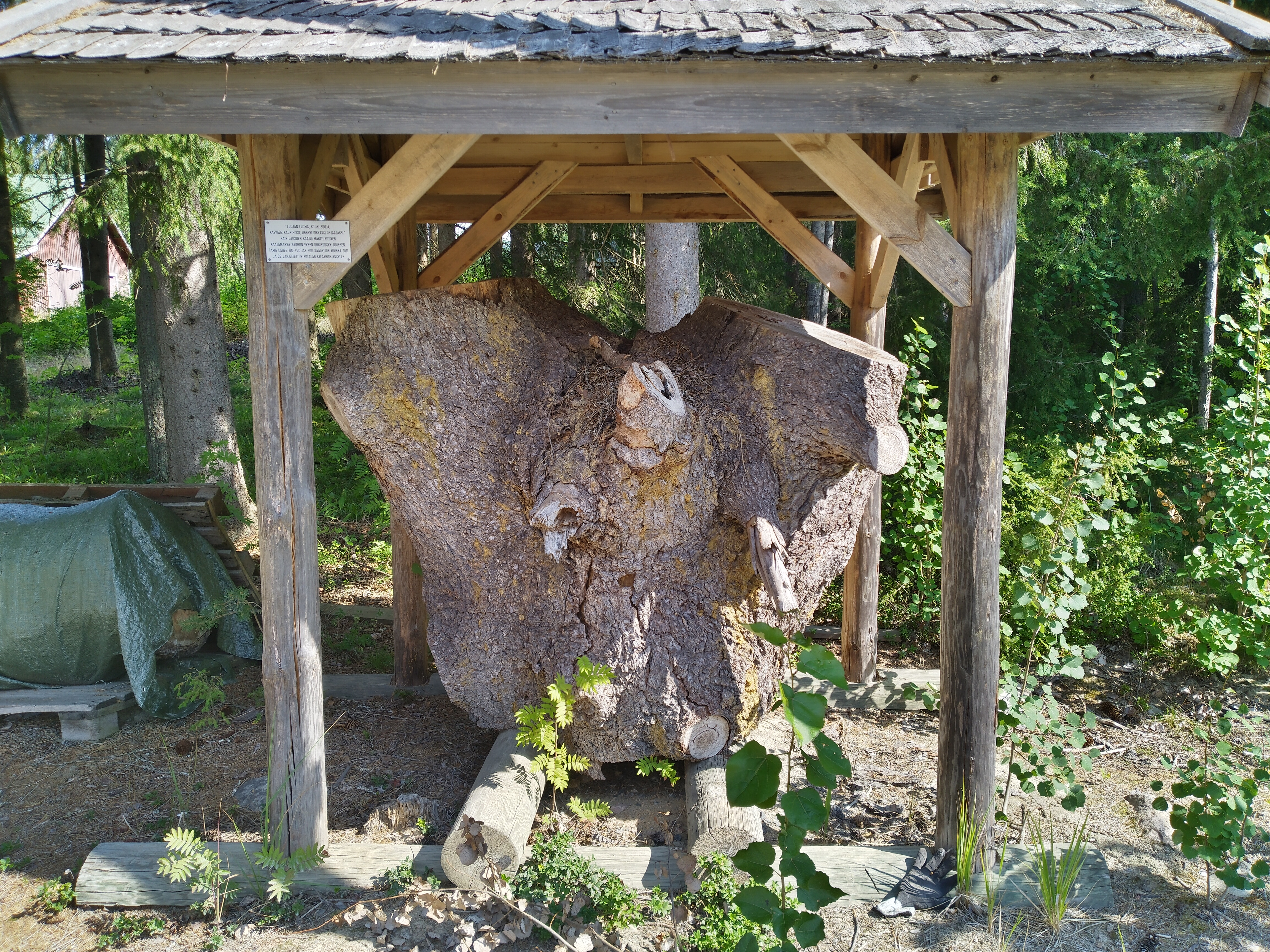 Kotalan kylätalon piha, Virrat.